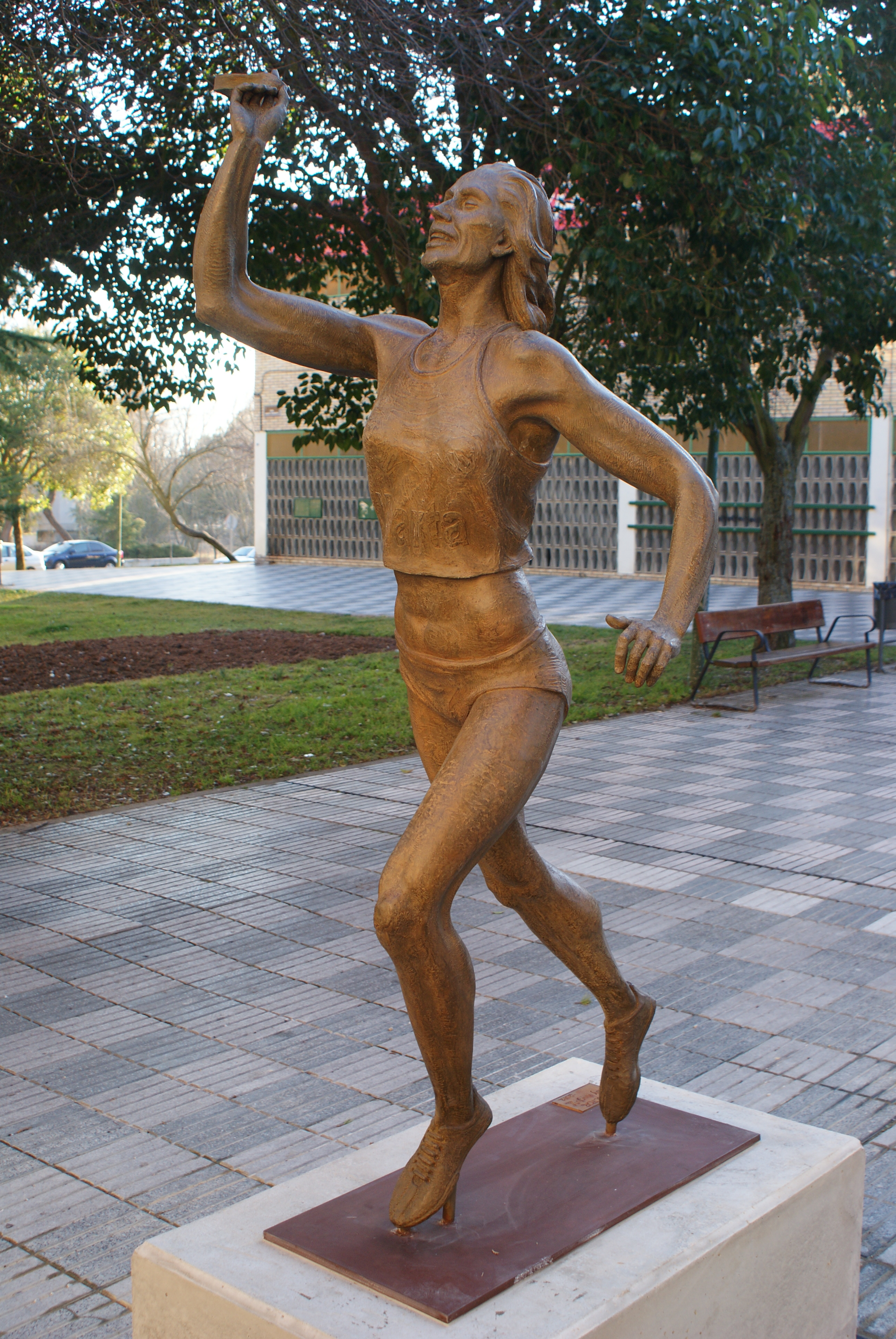 Escultura de Marta Domínguez ubicada en la ciudad de Palencia. Obra realizada por el escultor Luis Alonso en 2012.